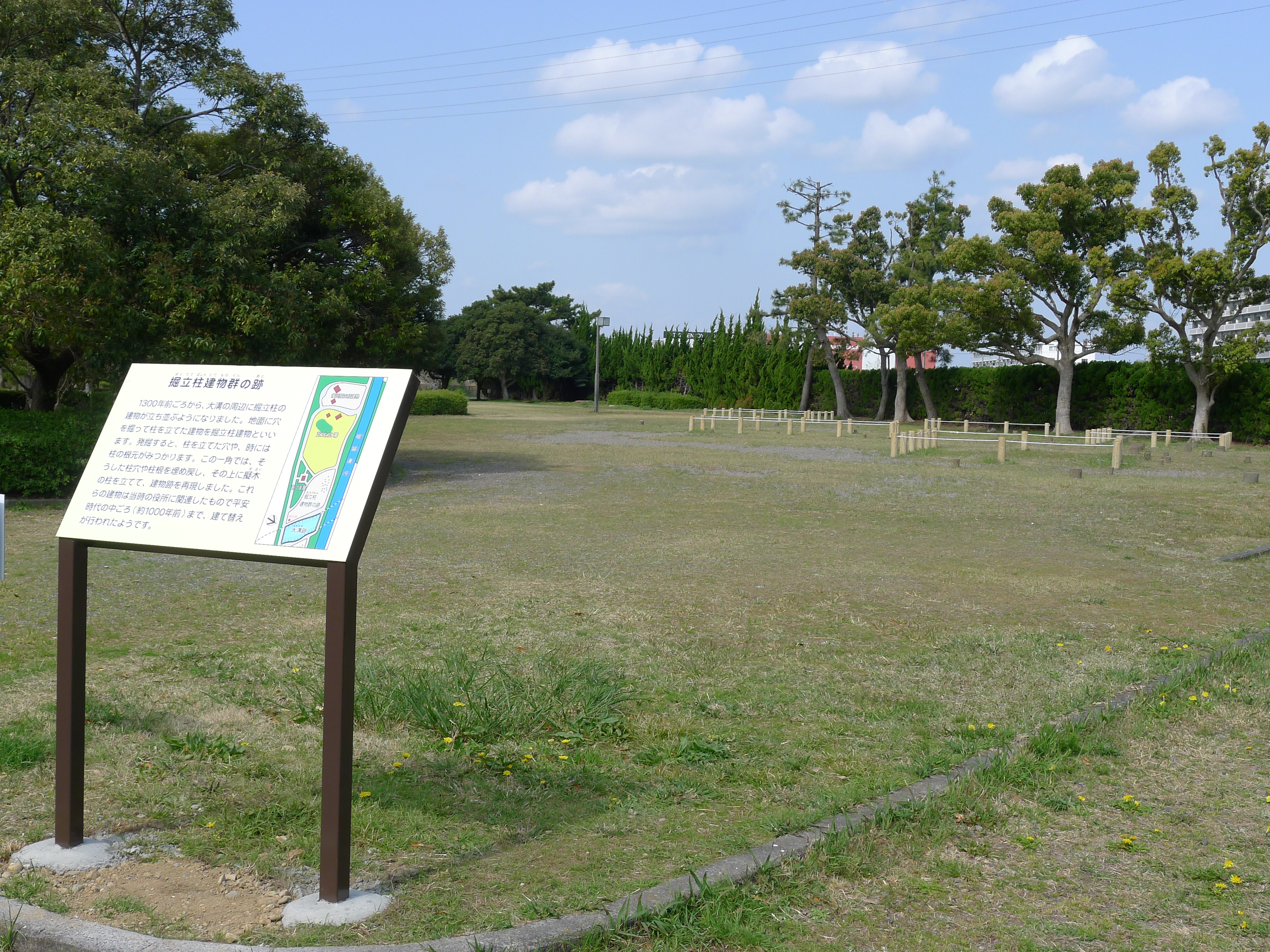 静岡県浜松市にある旧県指定史跡(指定解除)の伊場遺跡。